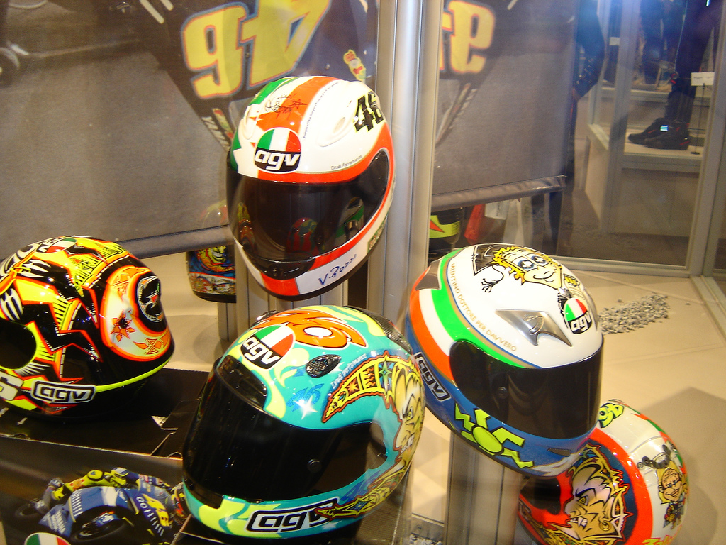 Valentino Rossi's AGV helmets